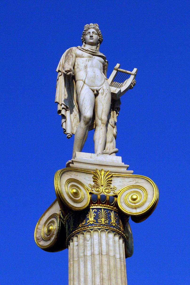 Apollon vor der Akademie der Wissenschaften